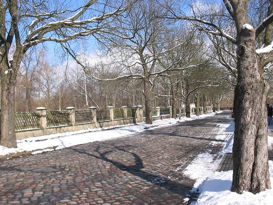 Oberseestraße, Orankeviertel, Berlin-Hohenschönhausen